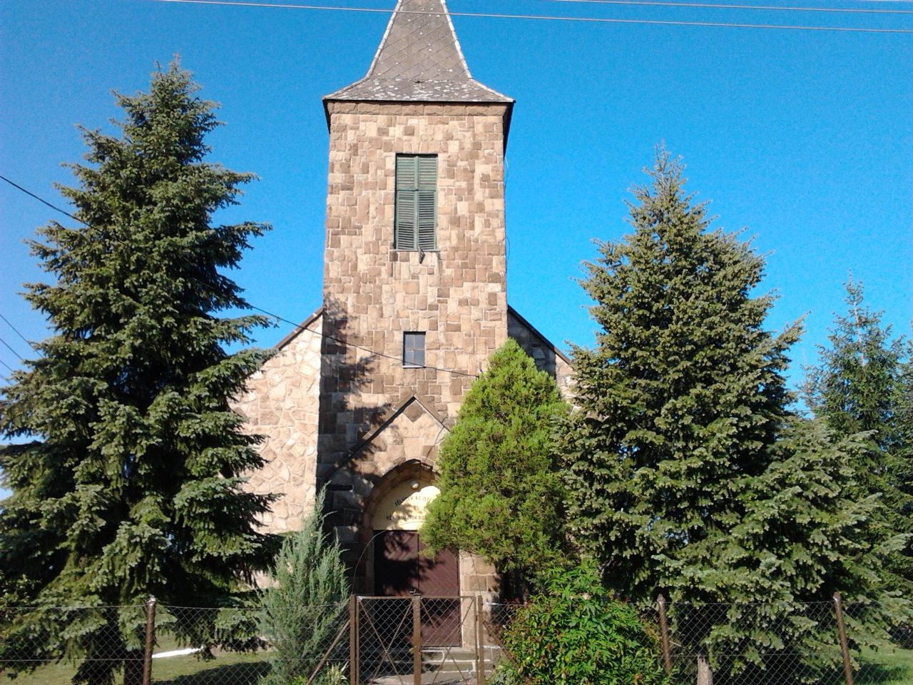 A maklári református templom kelet felőli bejárata (Heves megye)